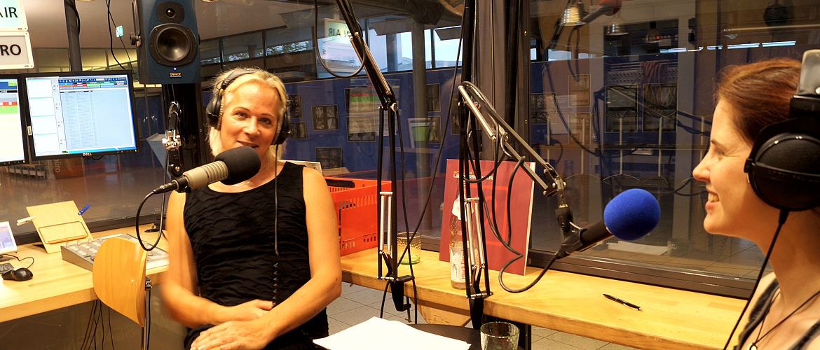 Talk mit Dana - Live auf Sendung